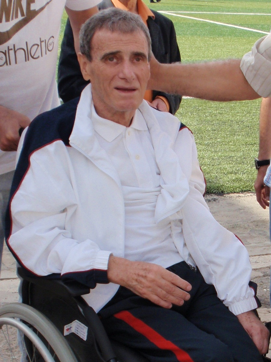 Abderrahmane Meziani au stade Omar-Hamadi à l'occasion de l'hommage rendu à Djamel Keddou le 10 mai 2013.